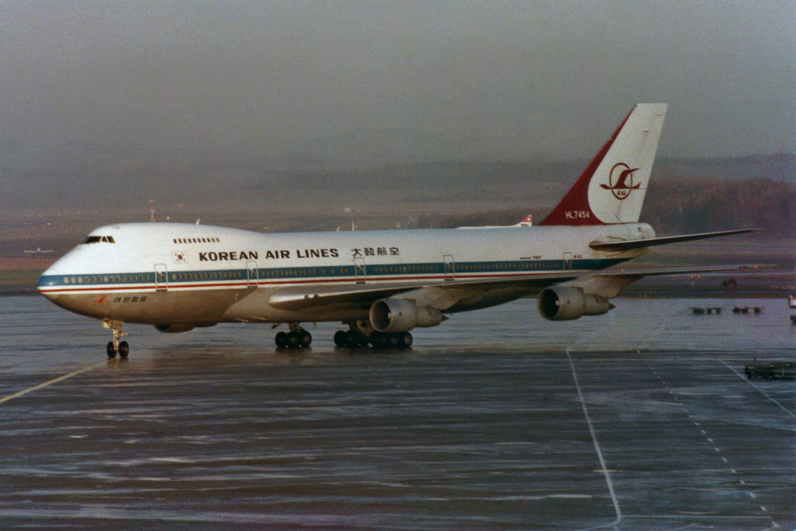 Zürich (- Kloten) (ZRH / LSZH) Switzerland 12.1984 First Flight 10.1980 Del. 11.1980 to Korean Air Lines (HL7454) MK Airlines (9G-MKM) MK Airlines (G-MKCA)